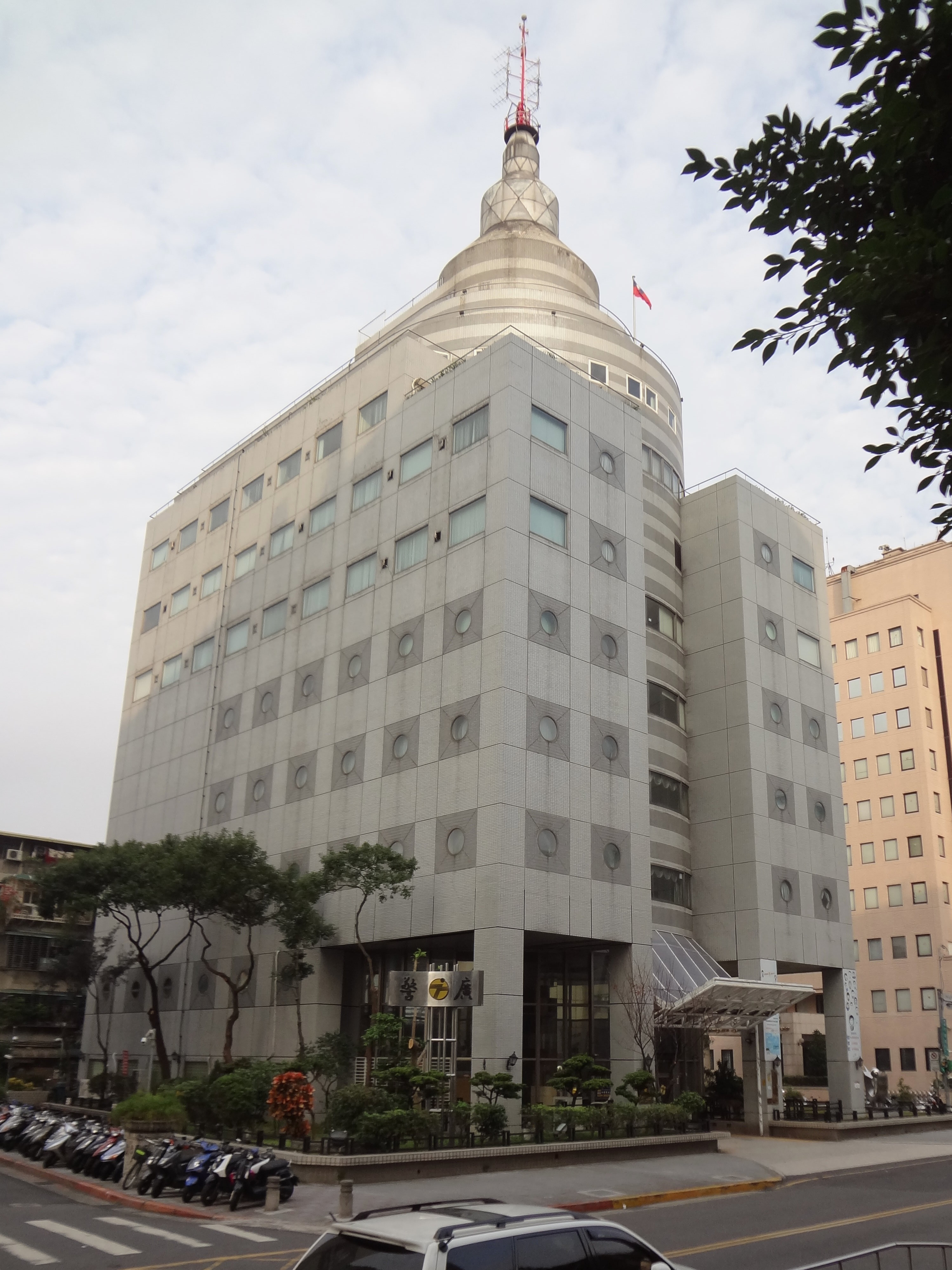 中文（台灣）: 警察廣播電台總台左側外觀。